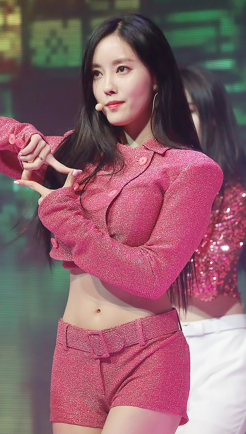 170614 티아라 쇼케이스 직찍